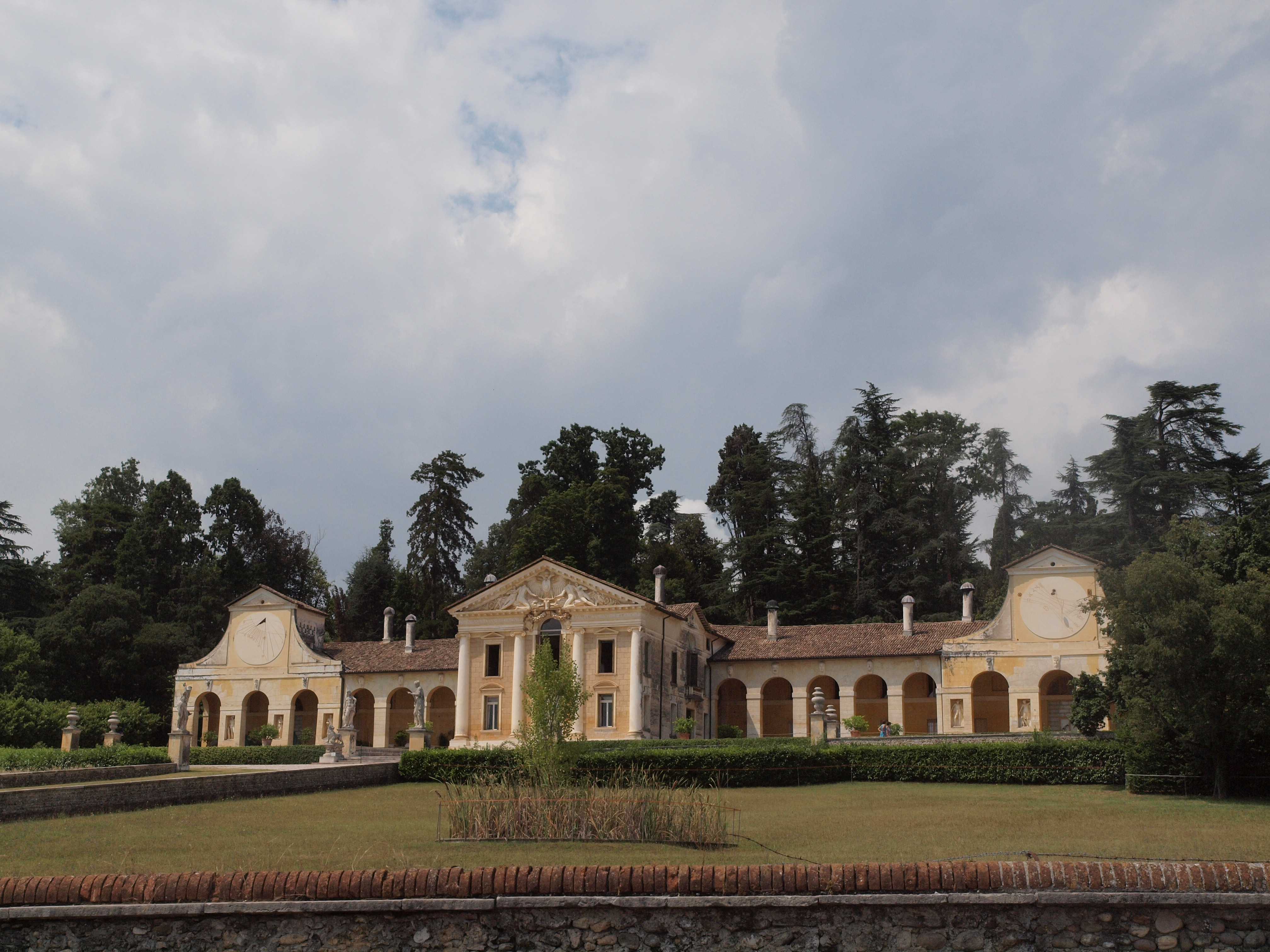 Villa Barbaro i Maser, Veneto, Italien. Tegnet af Andrea Palladio. 11. august 2012.